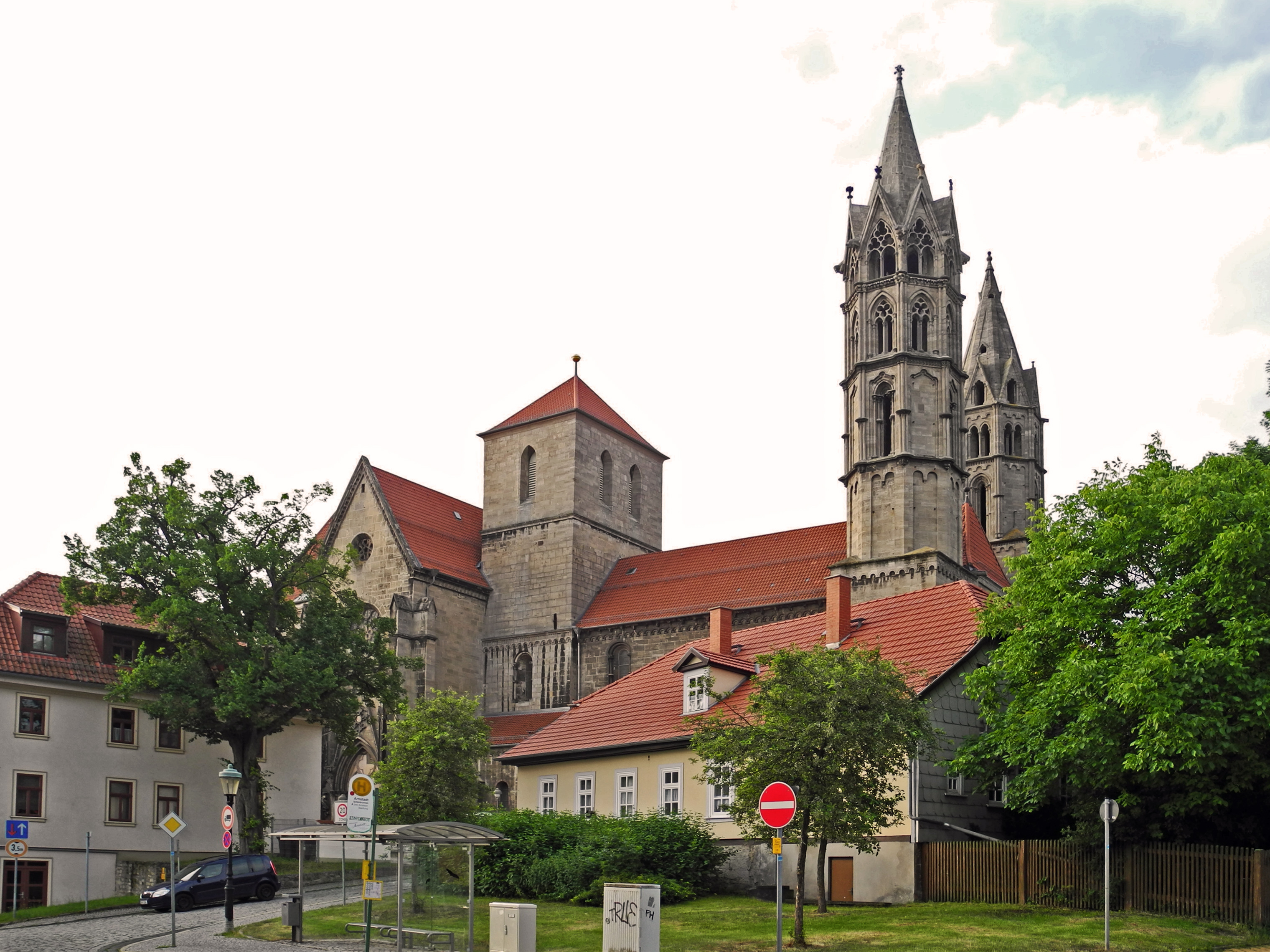 Liebfrauenkirche in Arnstadt - eine Kirche im Übergangsstil von der Romanik zur Gotik